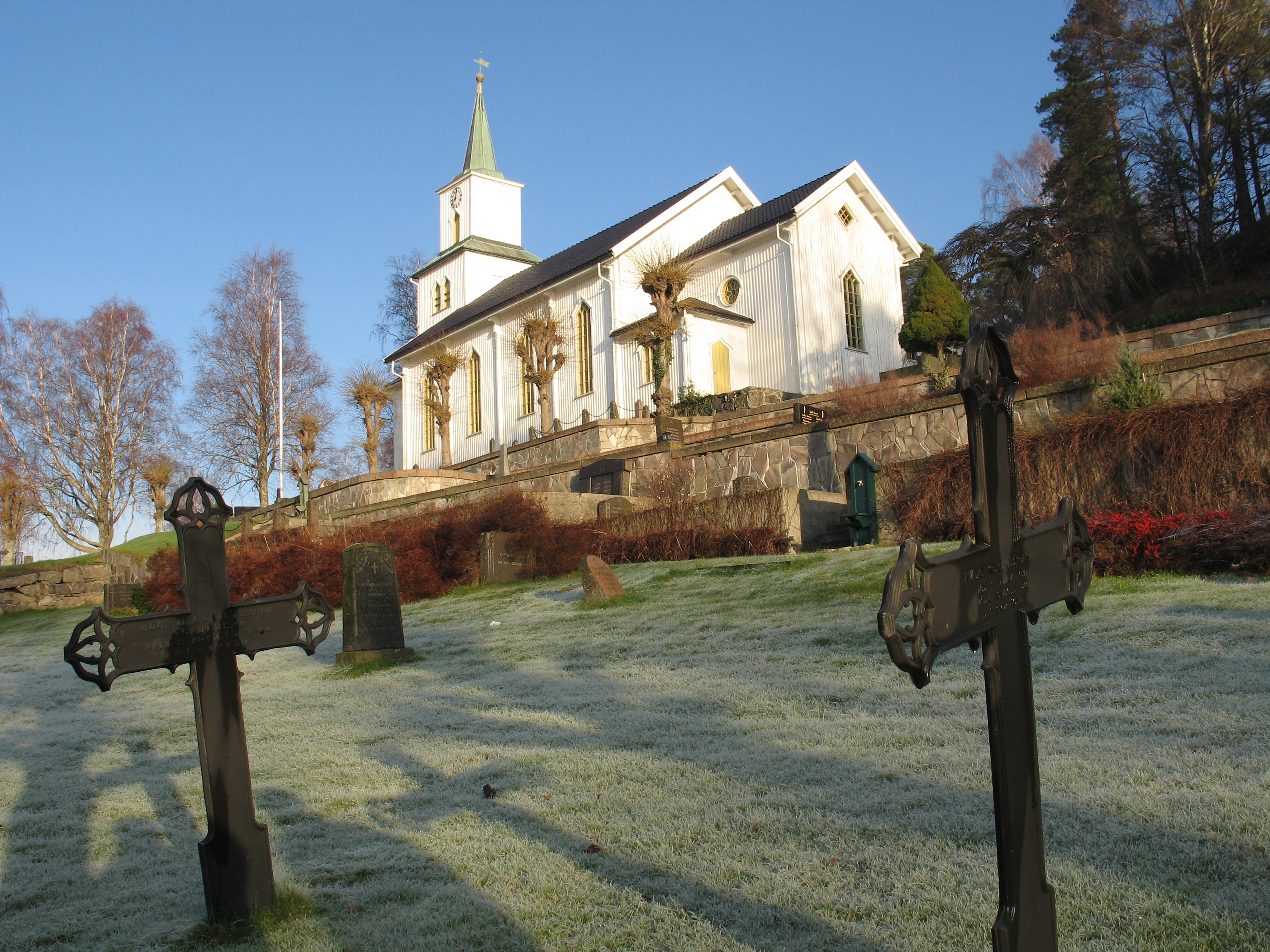 Stokken church in Arendal, Norway. Author:Karl Ragnar Gjertsen